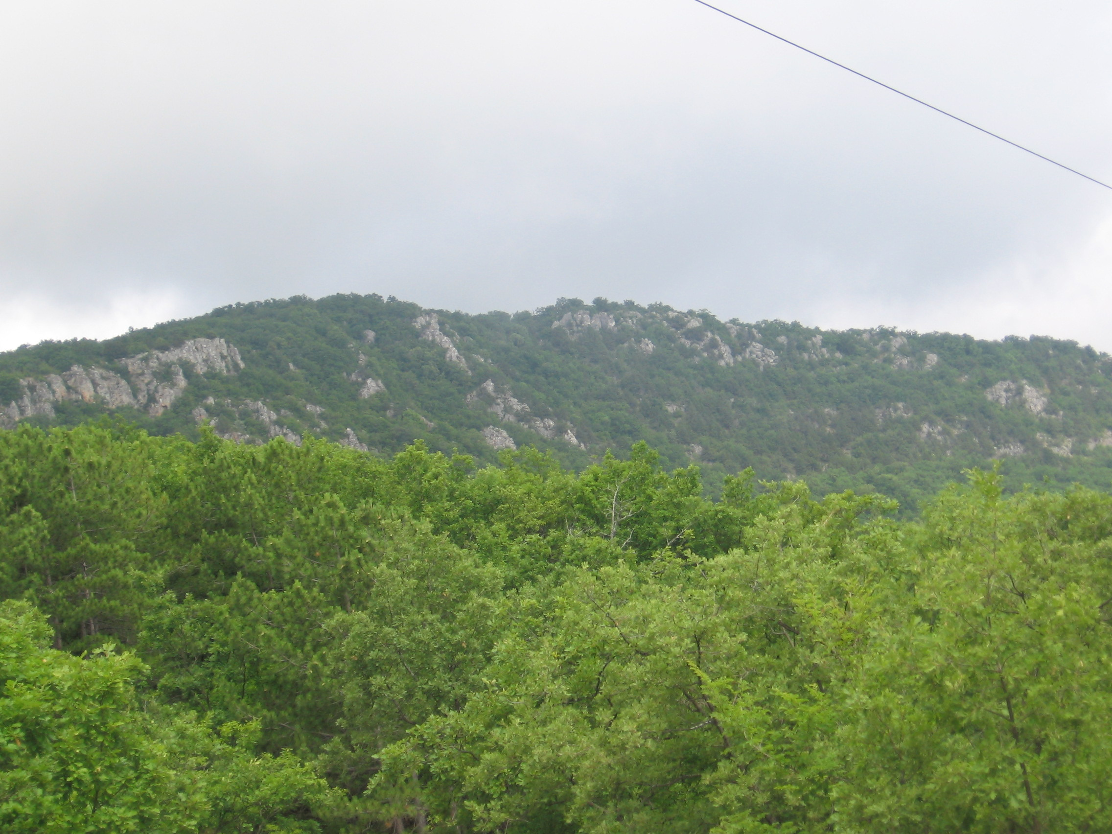 Скеля_Подпорічел: Фото